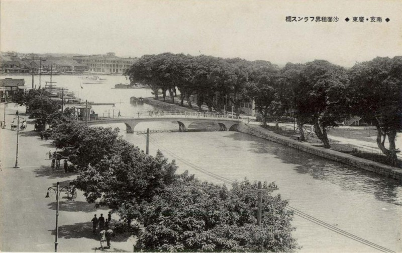 廣州市沙面